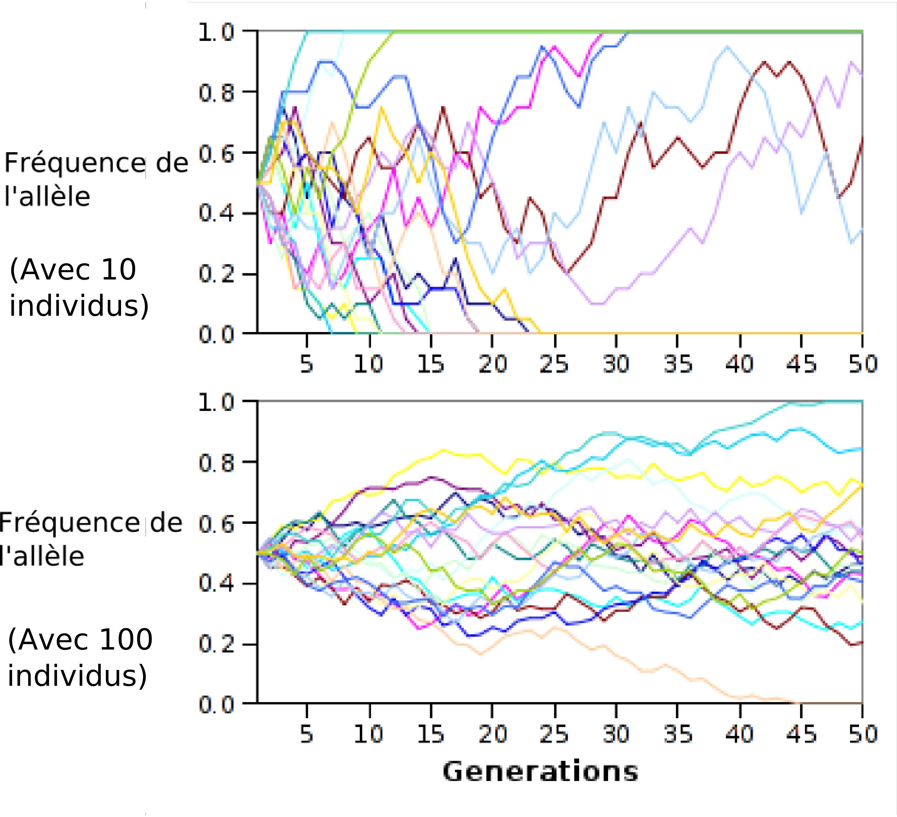 Allele-frequency-fr.png